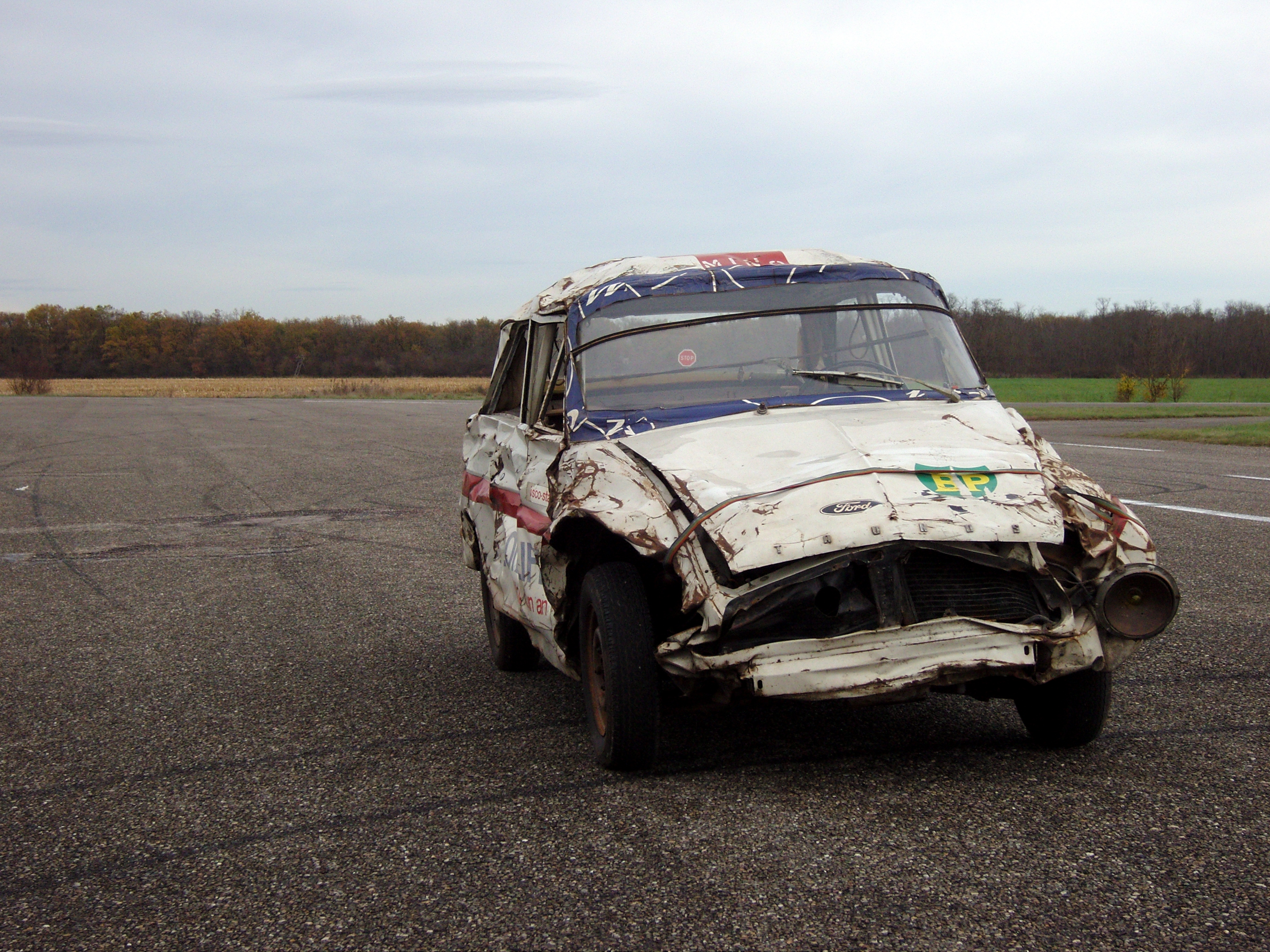 Das Rekordfahrzeug des Langstreckenrekordes von 1963.